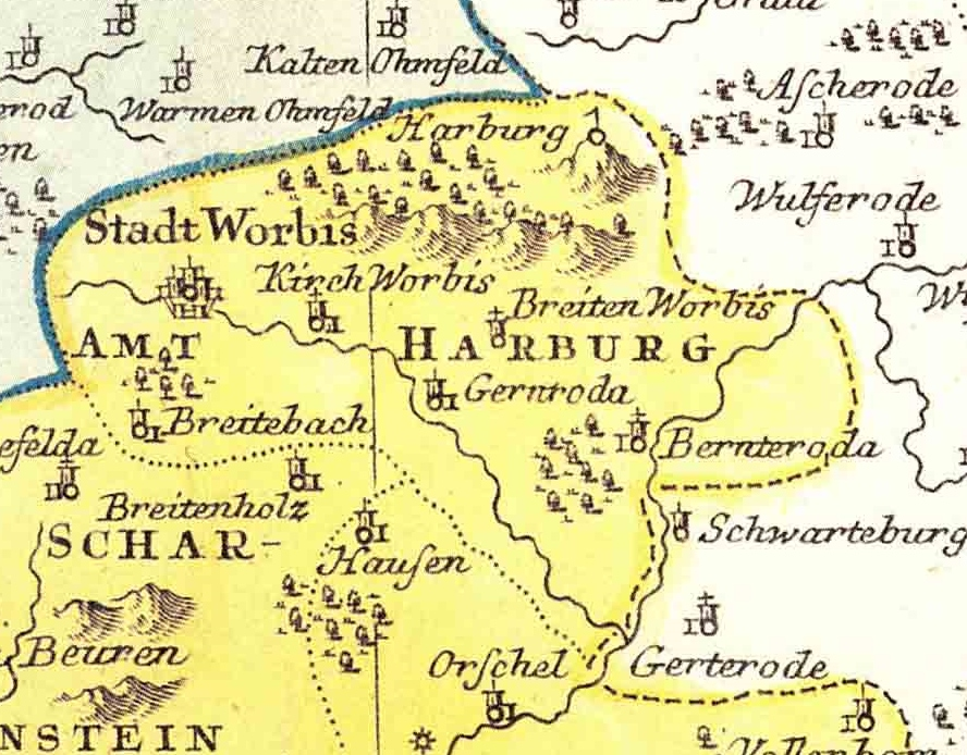 Ausschnitt aus der historischen Karte "Tractus Eichsfeldiae": das Amt Gleichenstein